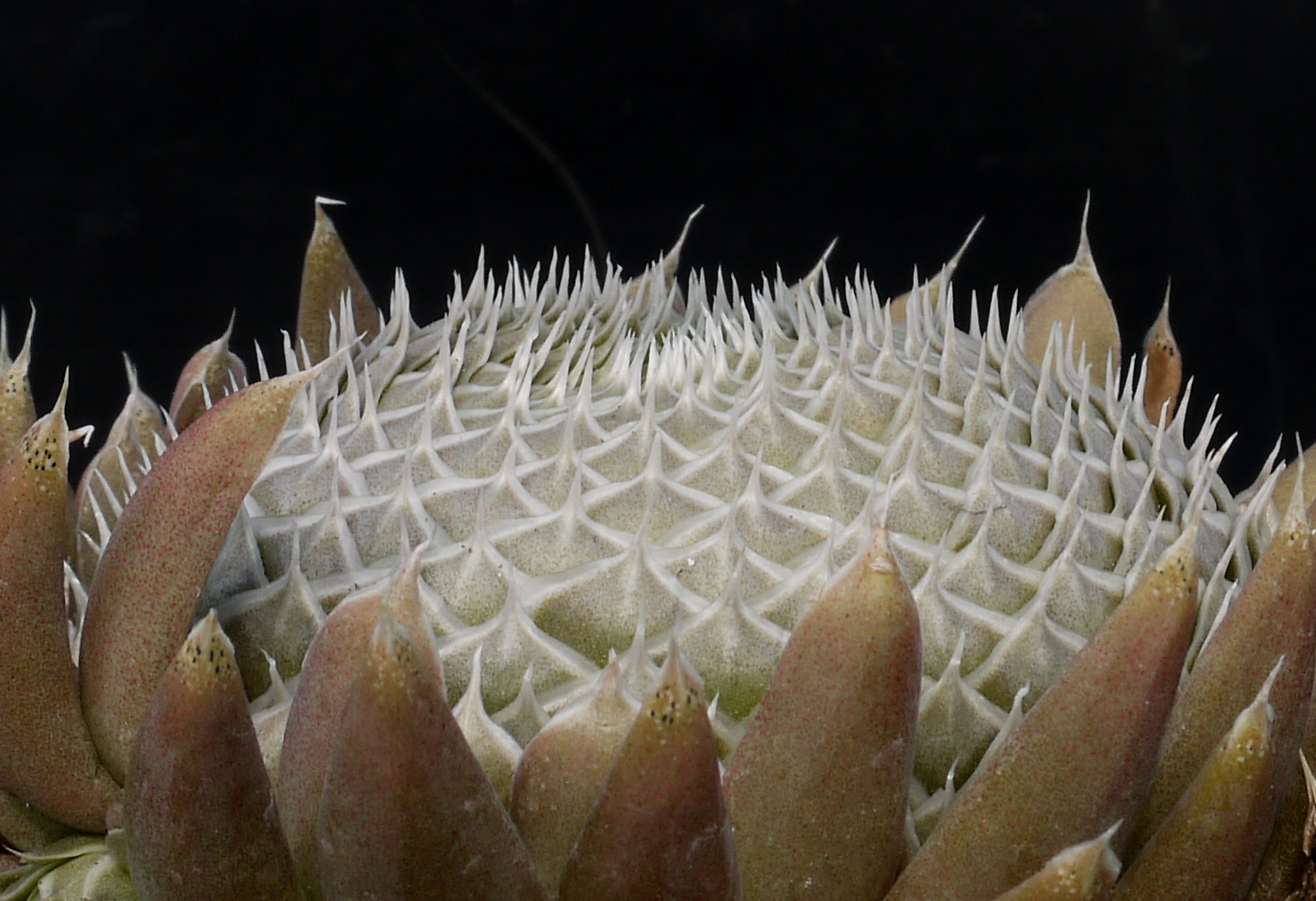 Pflanzenkörper von Orostachys spinosa.